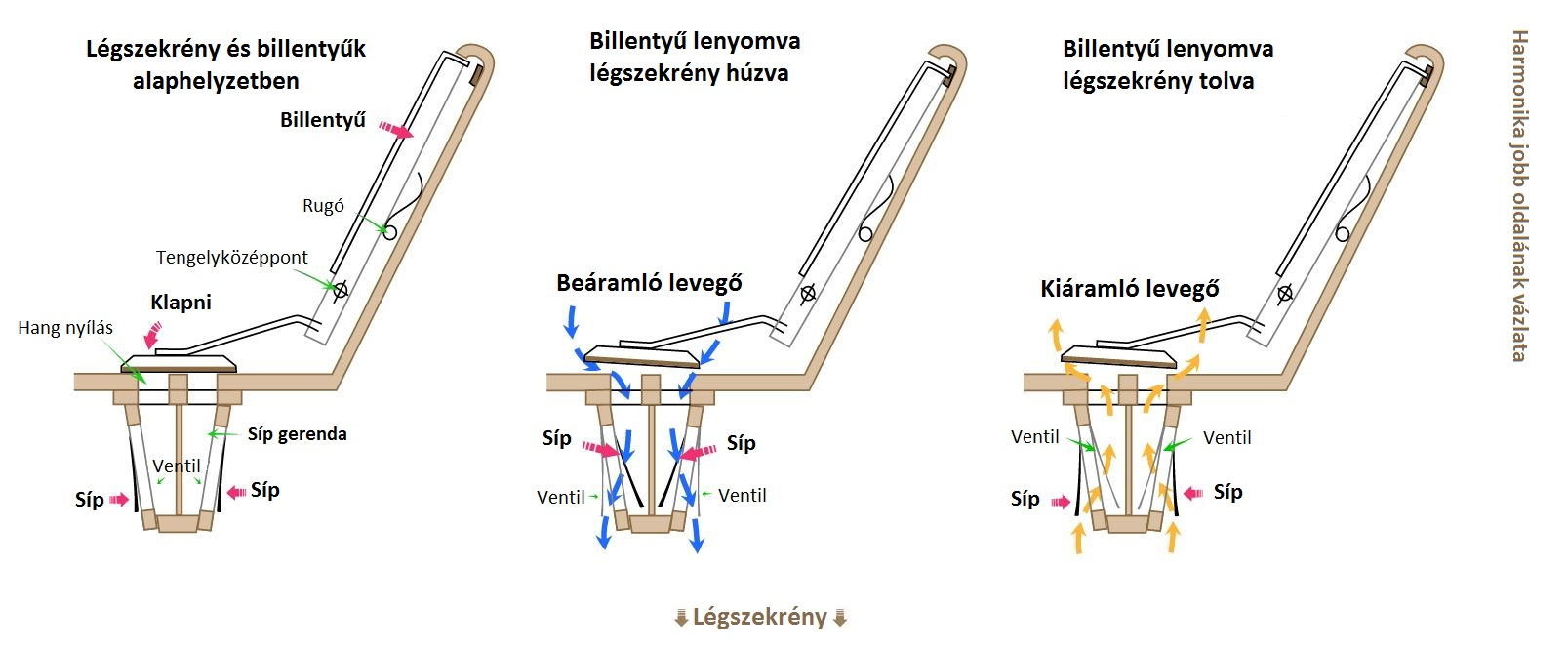 A harmonika jobb oldalának működési vázlata